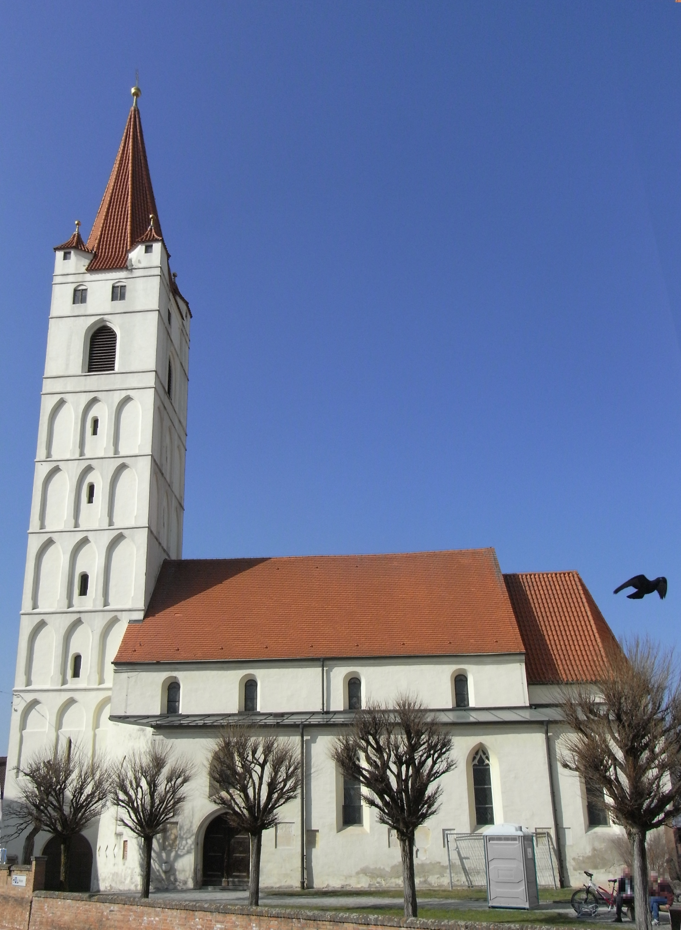 Moosburg an der Isar, Johanniskirche